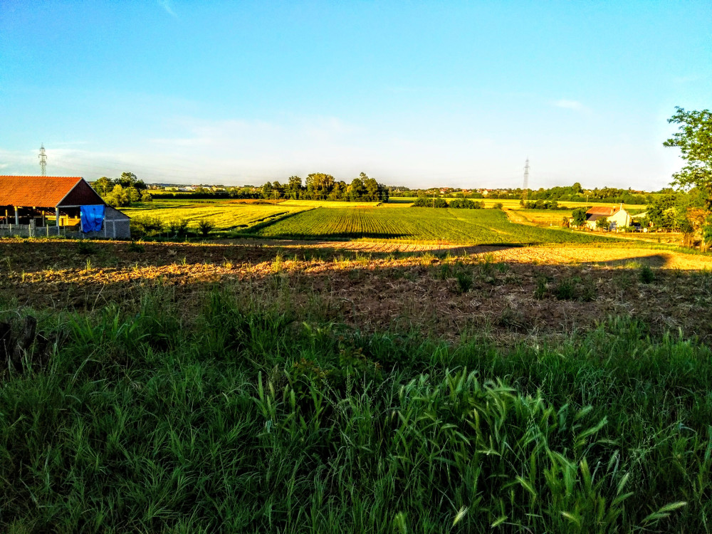 Поглед на долину реке Думаче из Поцерског Причиновића